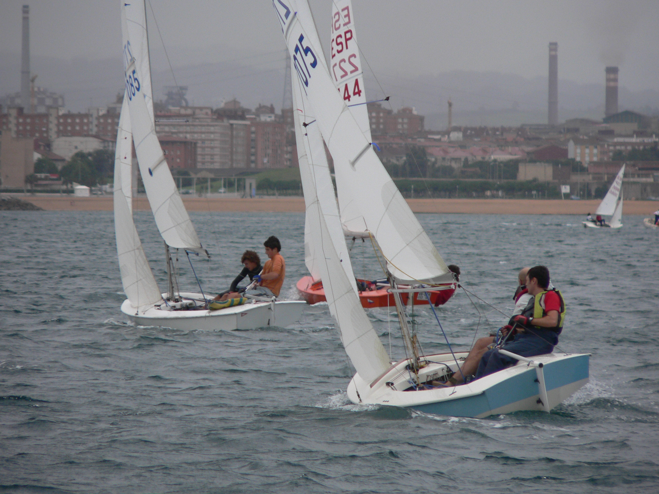 Snipe dinghies in Gijon, Spain, september 2006